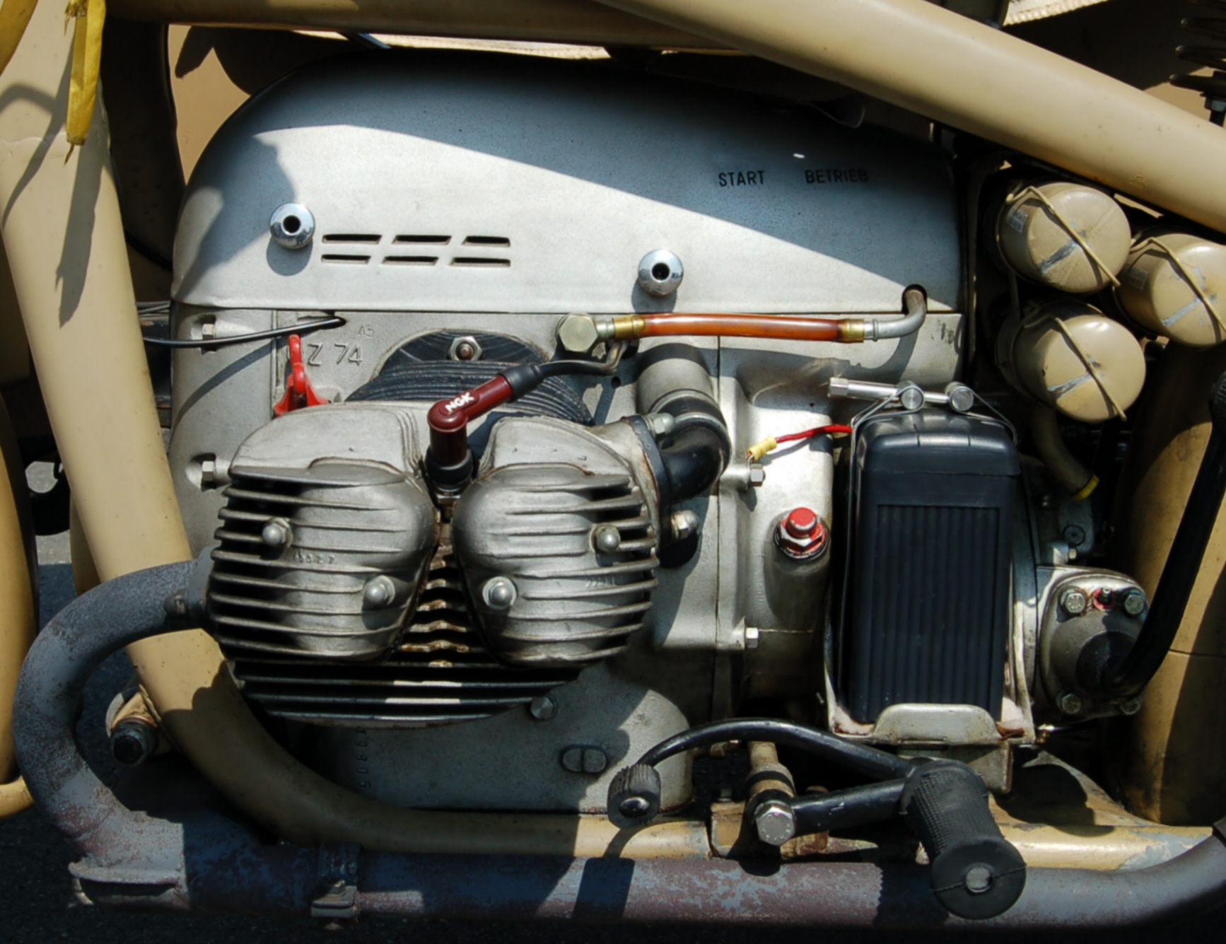 Motor (170°) einer Zündapp KS 750